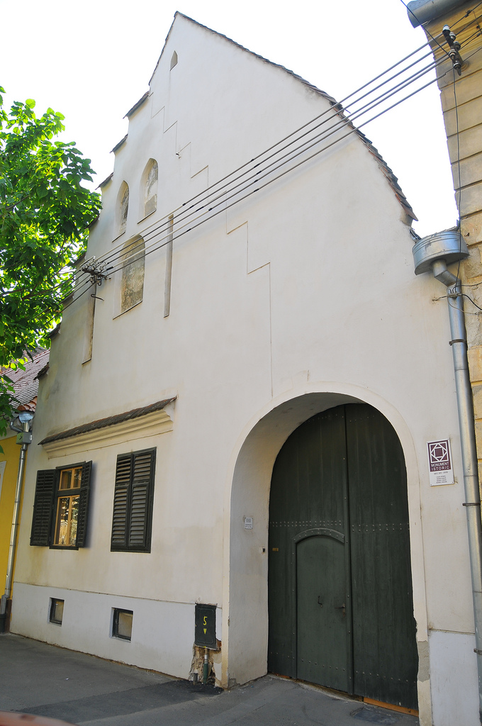 Str. Avram iancu nr: 16